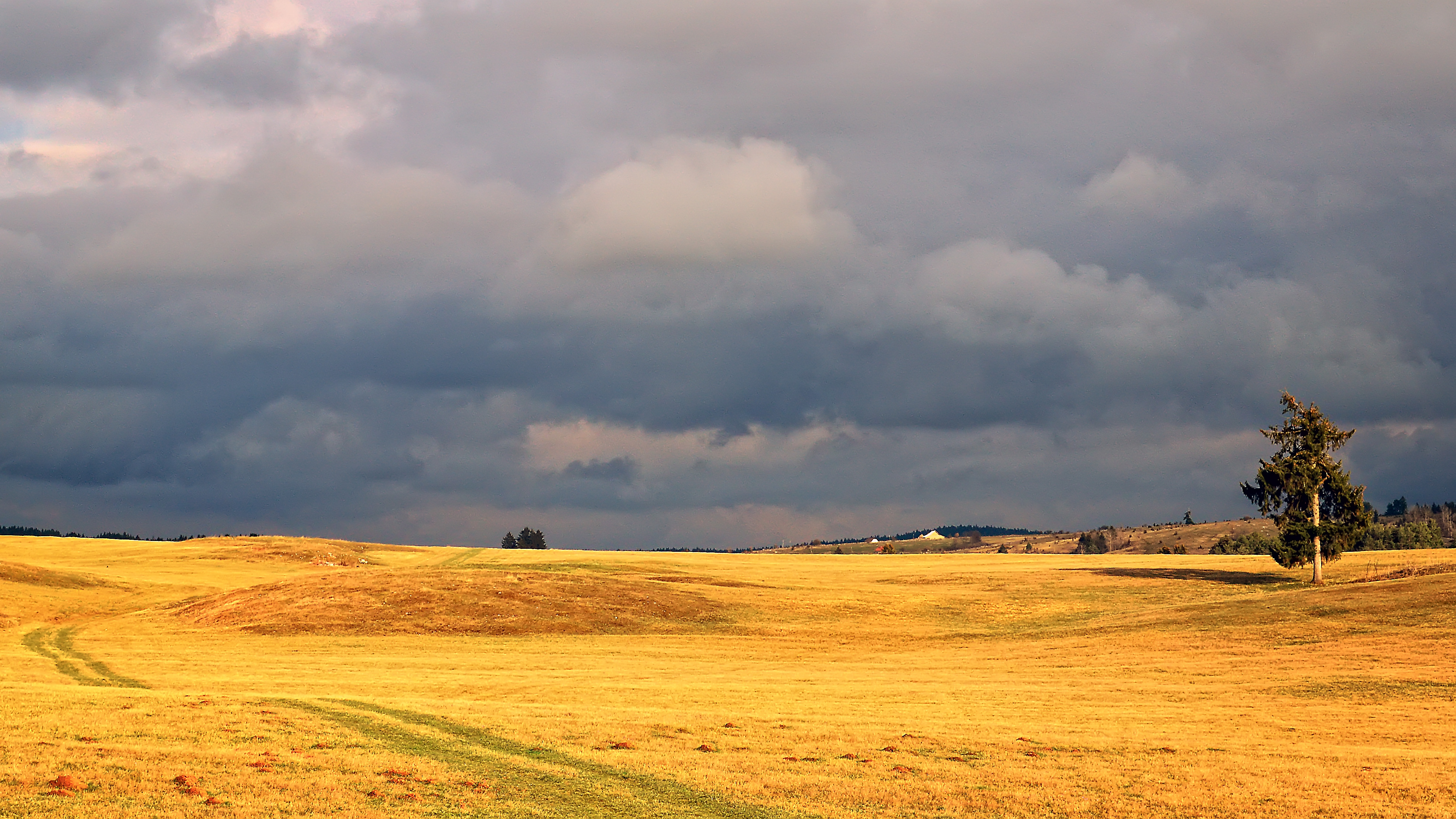 Prelijepa Romanijska visoravan kod Han Krama. Template:TOS16rs